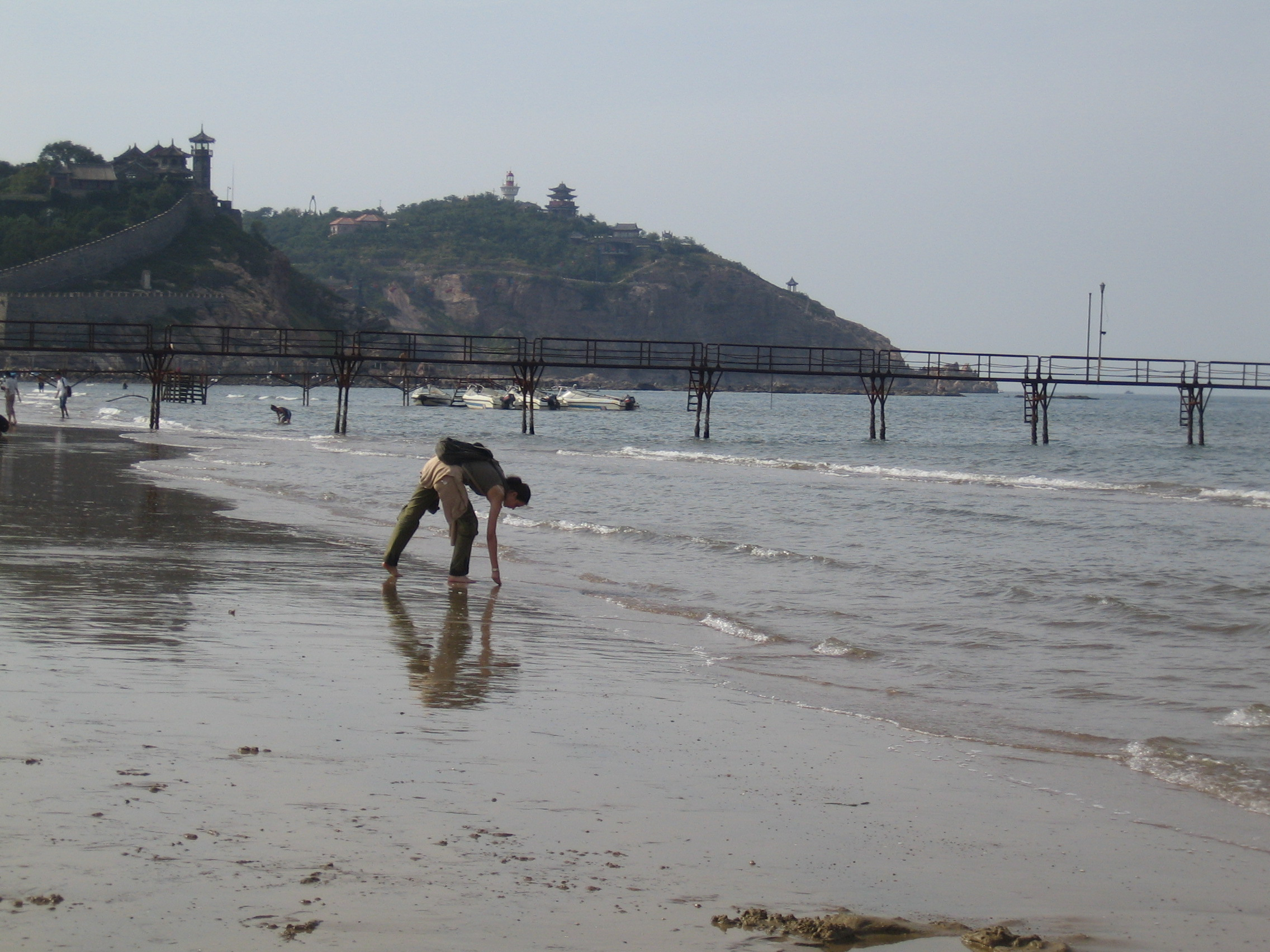 Penglai, Shandong, China